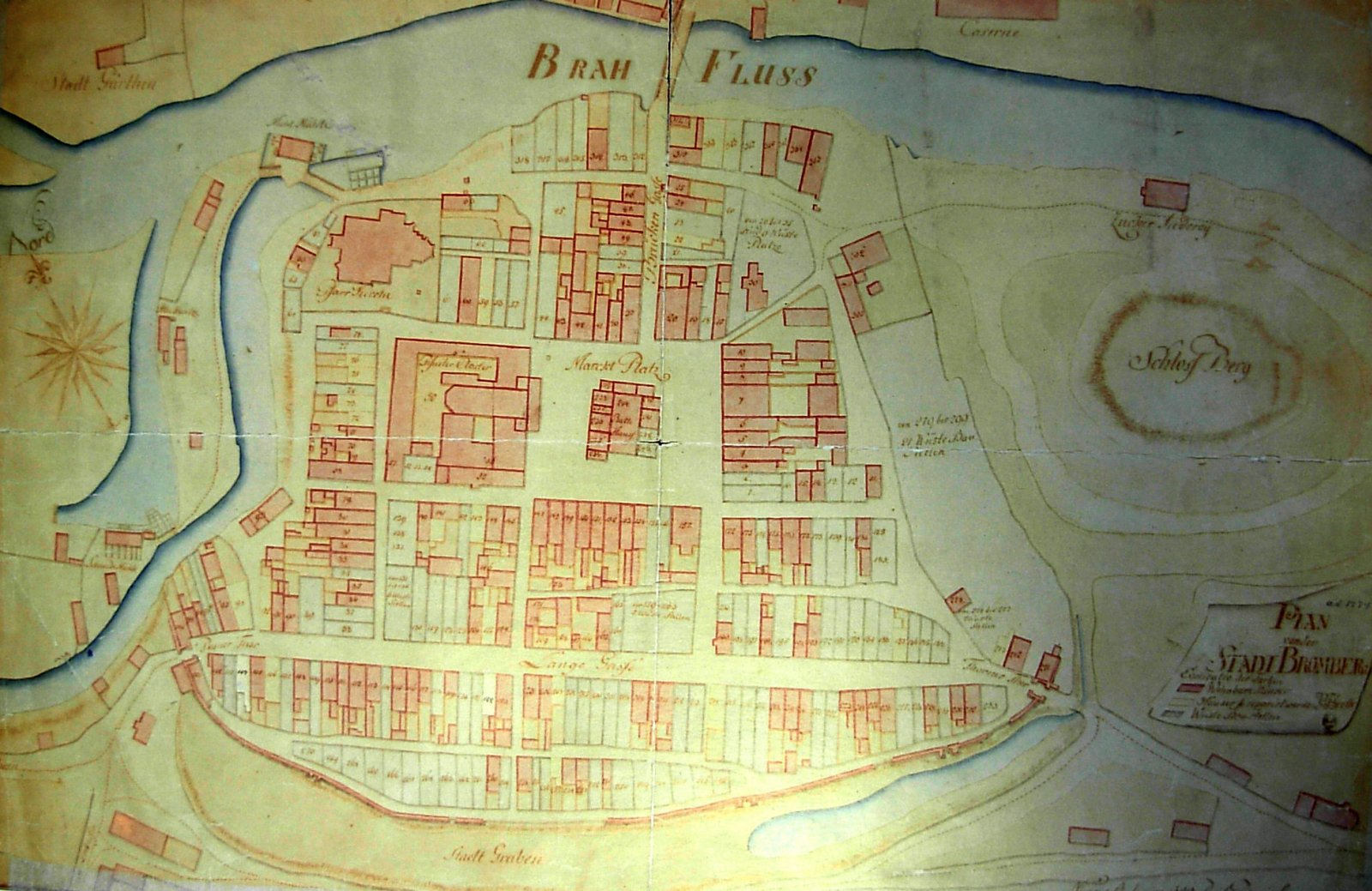 Plan Bydgoszczy z 1774 r. wykonany przez mierniczego i budowniczego pruskiego Paula Johanna Gretha